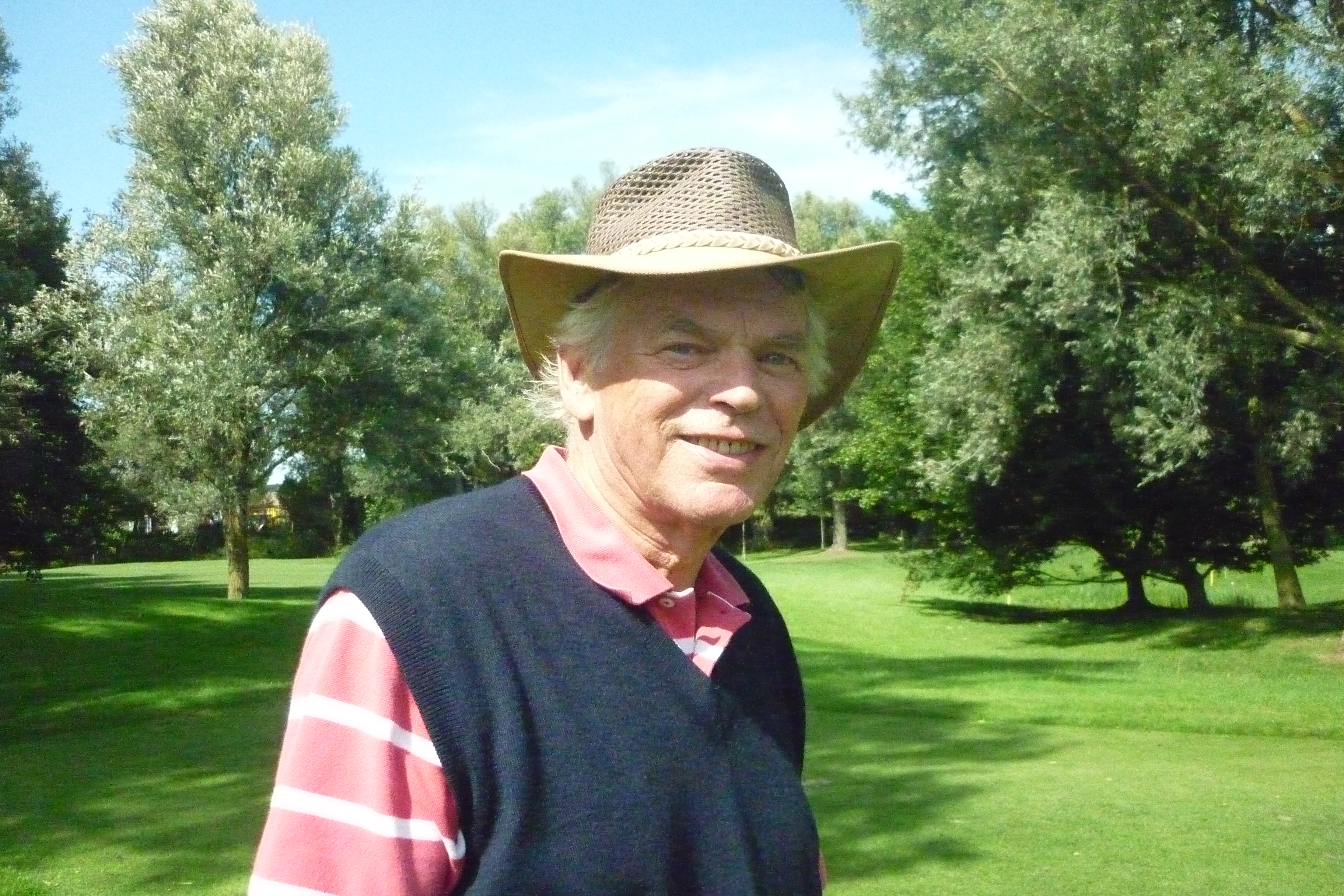 Vic Swane